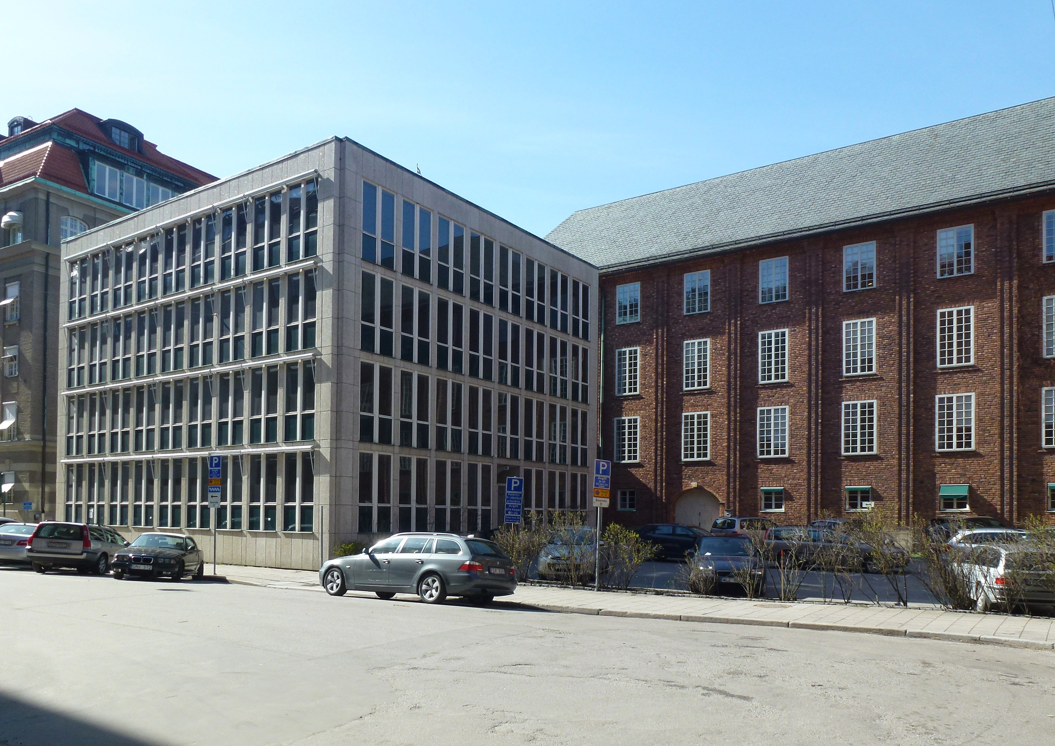 Patent- och registreringsverket, Stockholm. Nybyggnadsår:1959 - 1963, Bengt Romare (Arkitekt) Georg Scherman (Arkitekt)